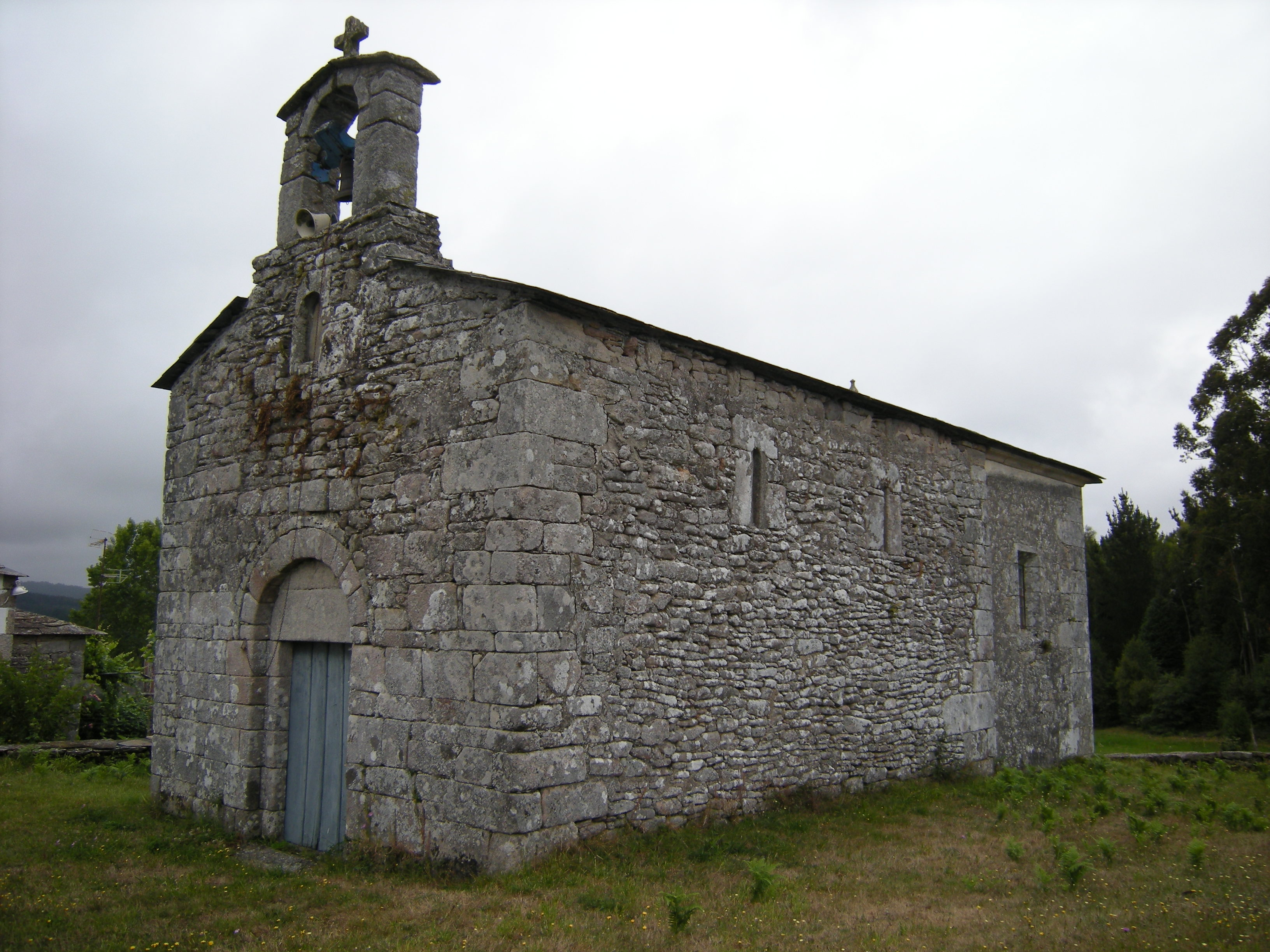 La iglesia es una sencilla muestra de románico rural. Tiene planta de nave rectangular al igual que su desaparecido ábside. El actual es de factura moderna.